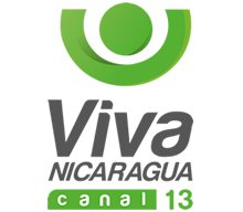 Logo de canal de televisión Viva Nicaragua Canal 13